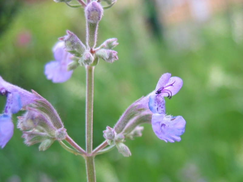 Blüte im Detail der Großblütigen Katzenminze Nepeta grandifolra